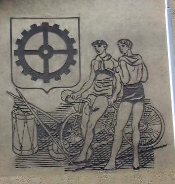 Wappen Industriequartier Zürich (Stadtkreis 5) auf Wand Turnhalle Schulhaus Kornhausbrücke, Ecke Gasometer-Strasse. Dieses Wandbild führte zum Kreiswappen.